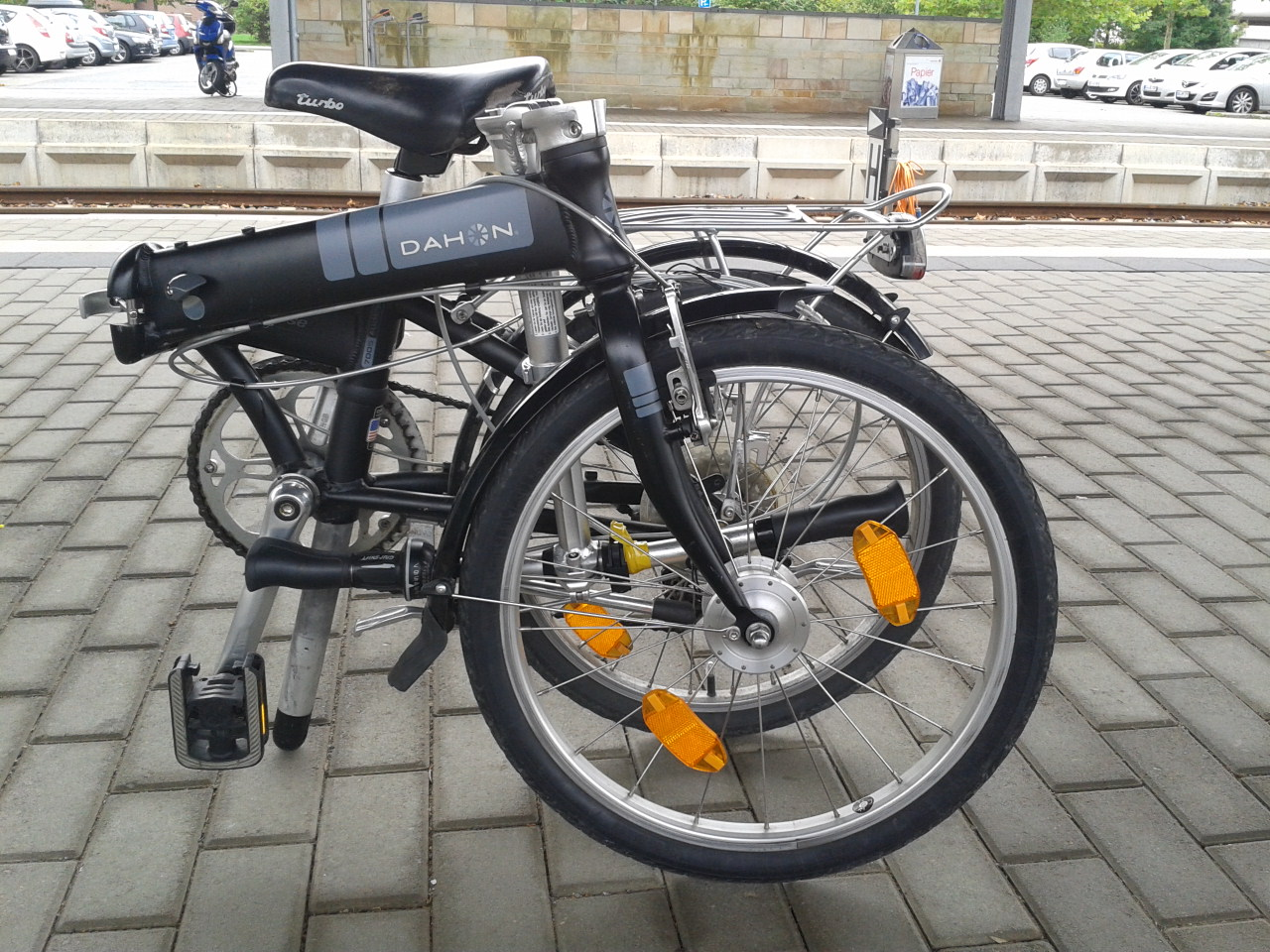 Dahon Vitesse von 2008, gefaltet